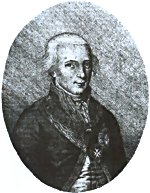 Luis Pinto de Sousa Coutinho (1735-1804) Portuguese politician